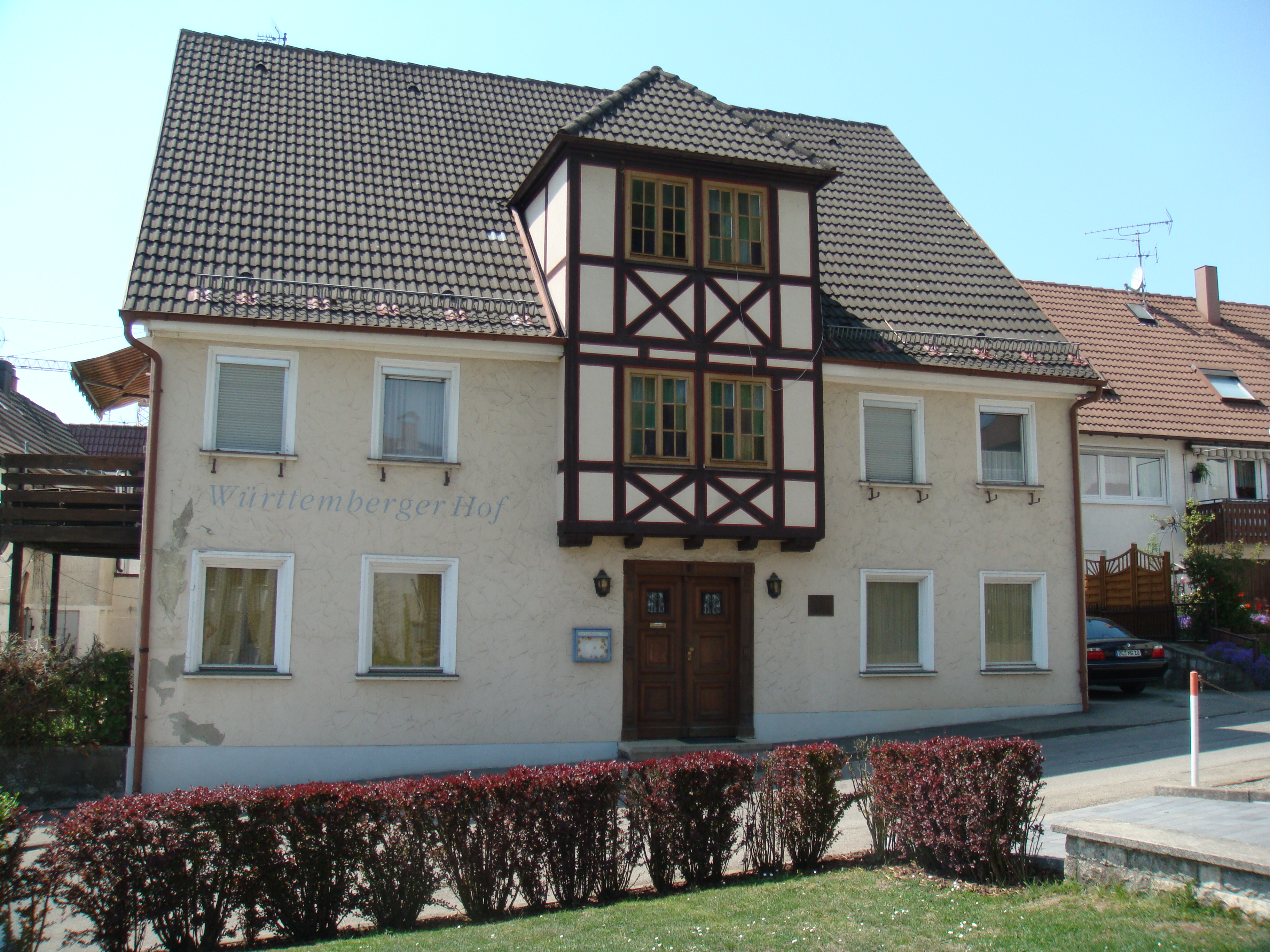 Rabbinat und Schule seit 1828. Not-Synagoge und Zwangs-Altersheim von 1938 bis 1942. Alle Bewohner wurden Opfer des Holocaust.